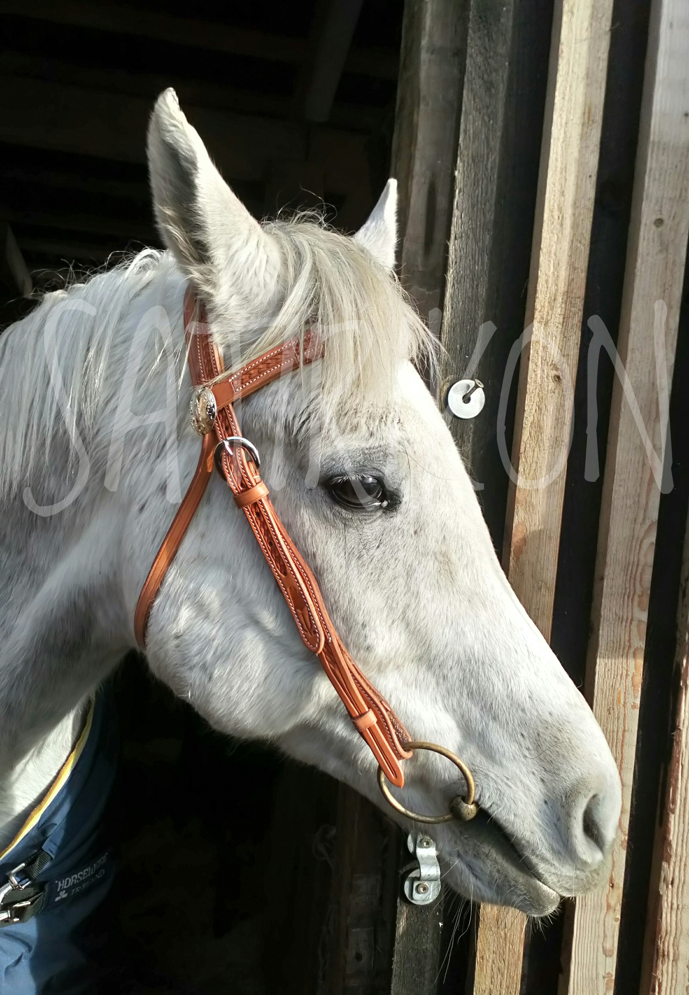 Puudub kapsel